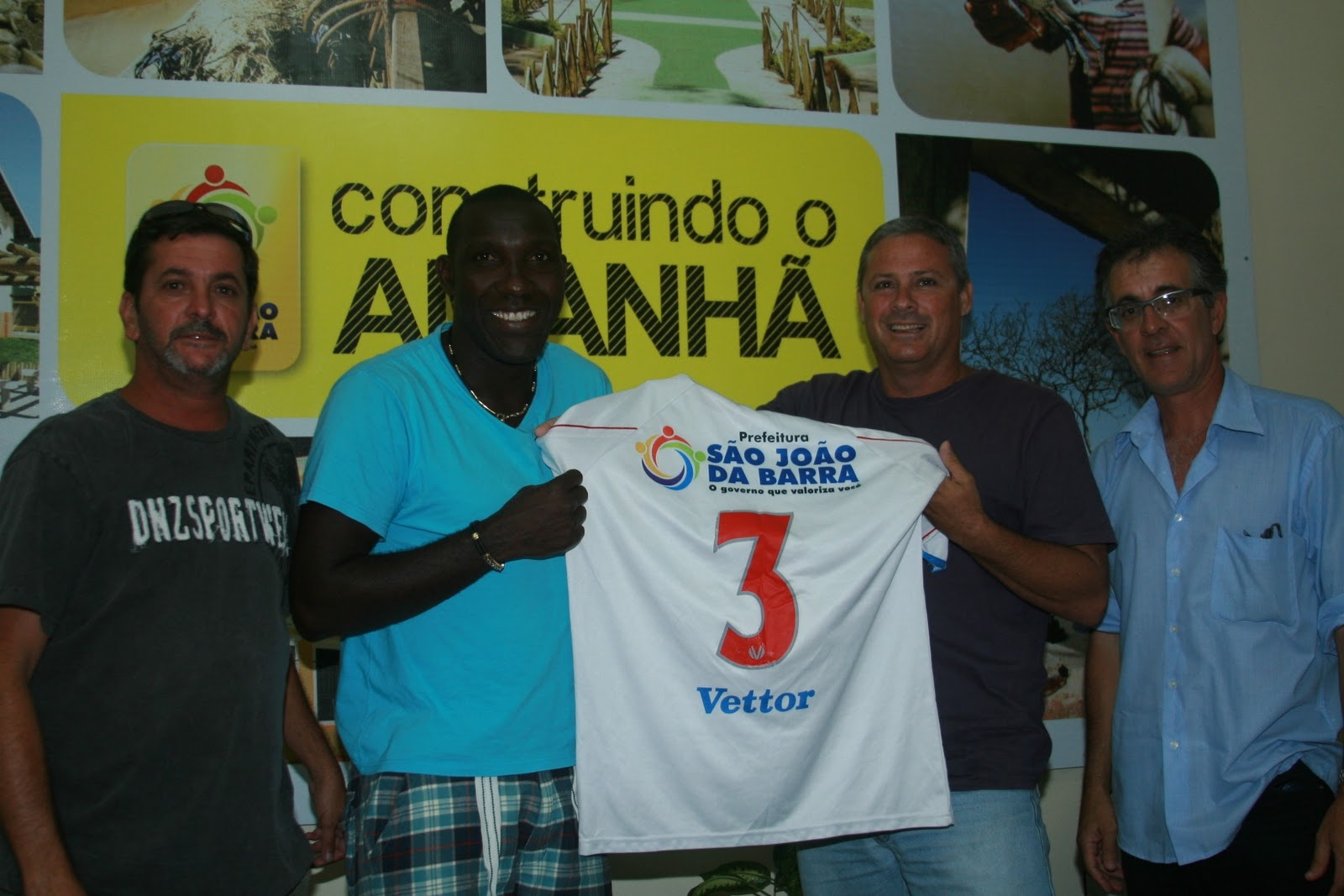 A apresentação de Odvan no São João da Barra em 2011.